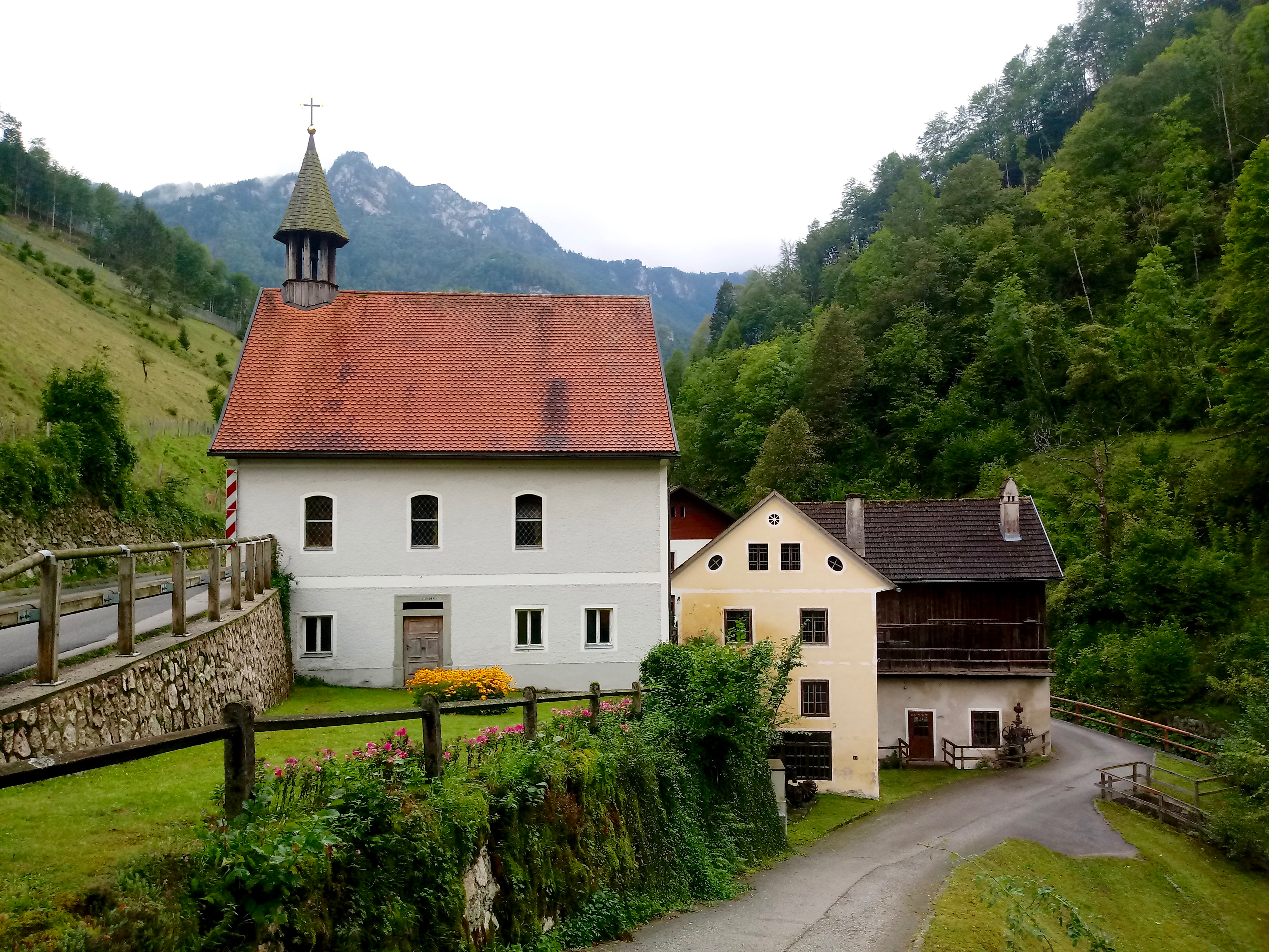 Wikipedia:WikiProjekt Traditionelles Handwerk/Trattenbach: Filialkirche Ternberg-Trattenbach und Museum in der Wegscheid.